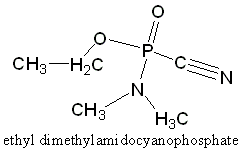 Tabun